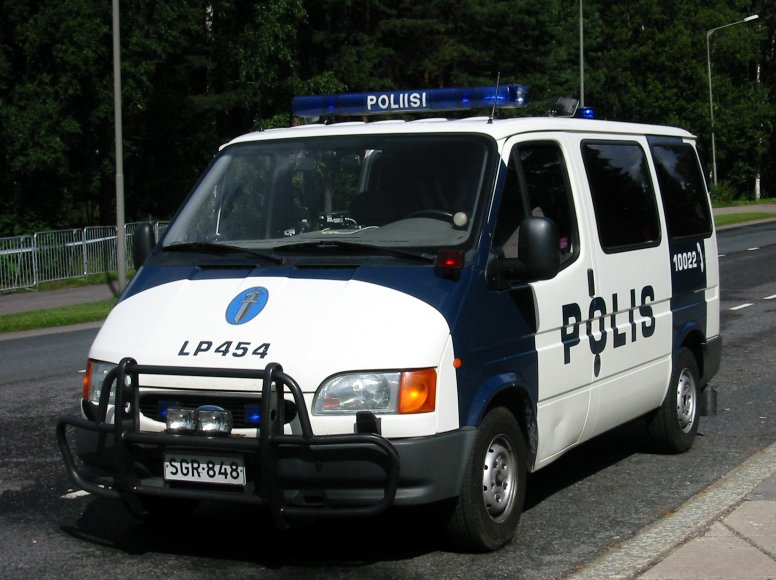 Liikkuvan poliisin auto Espoon Otaniemessä Yleisurheilun MM-kisojen aikaan.